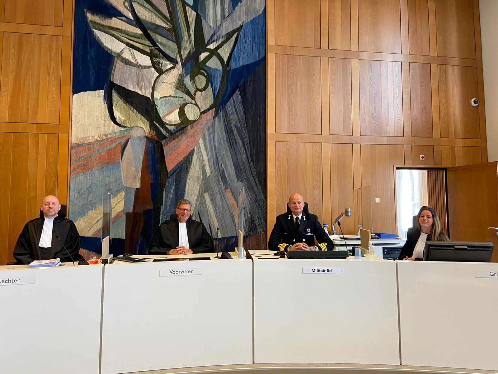 Militaire Kamer in meervoudige samenstelling